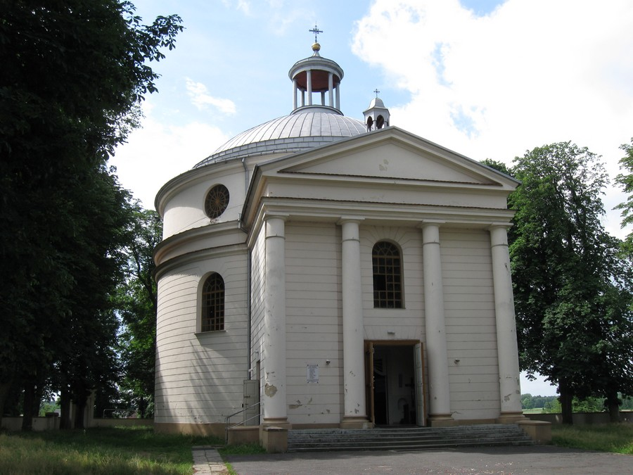 Kościół parafialny p.w. śś. Piotra i Pawła w Żyrzynie